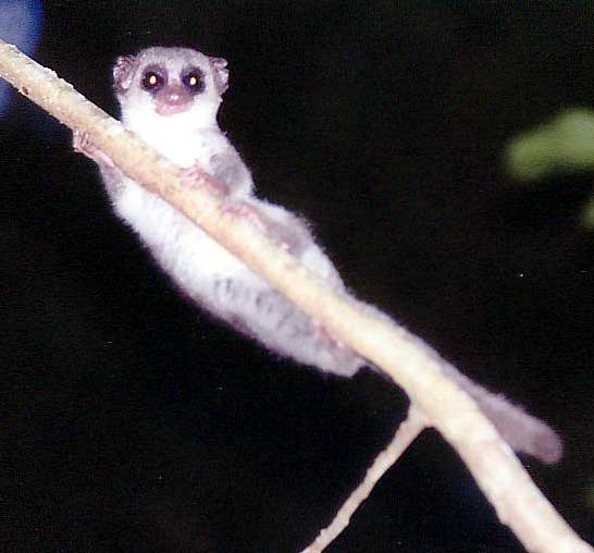 Cheirogaleus medius (Mittlerer Fettschwanzmaki)